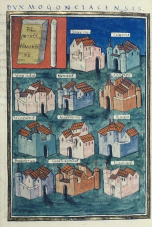 Dux Mogontiacensis from Notitia dignitatum